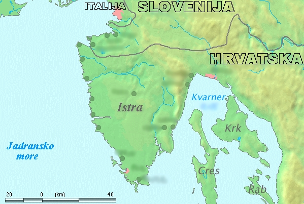 Istra, topografska karta